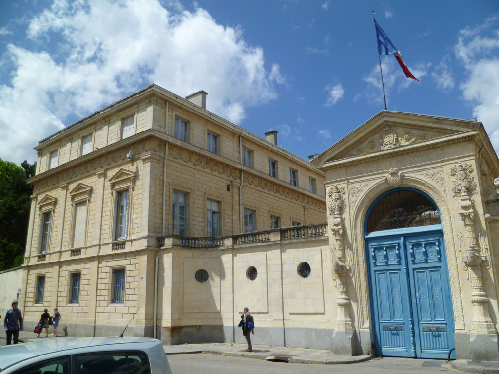 portail et aile sur jardins de l'hôtel de la Préfecture de Caen {Calvados, Basse-Normandie).